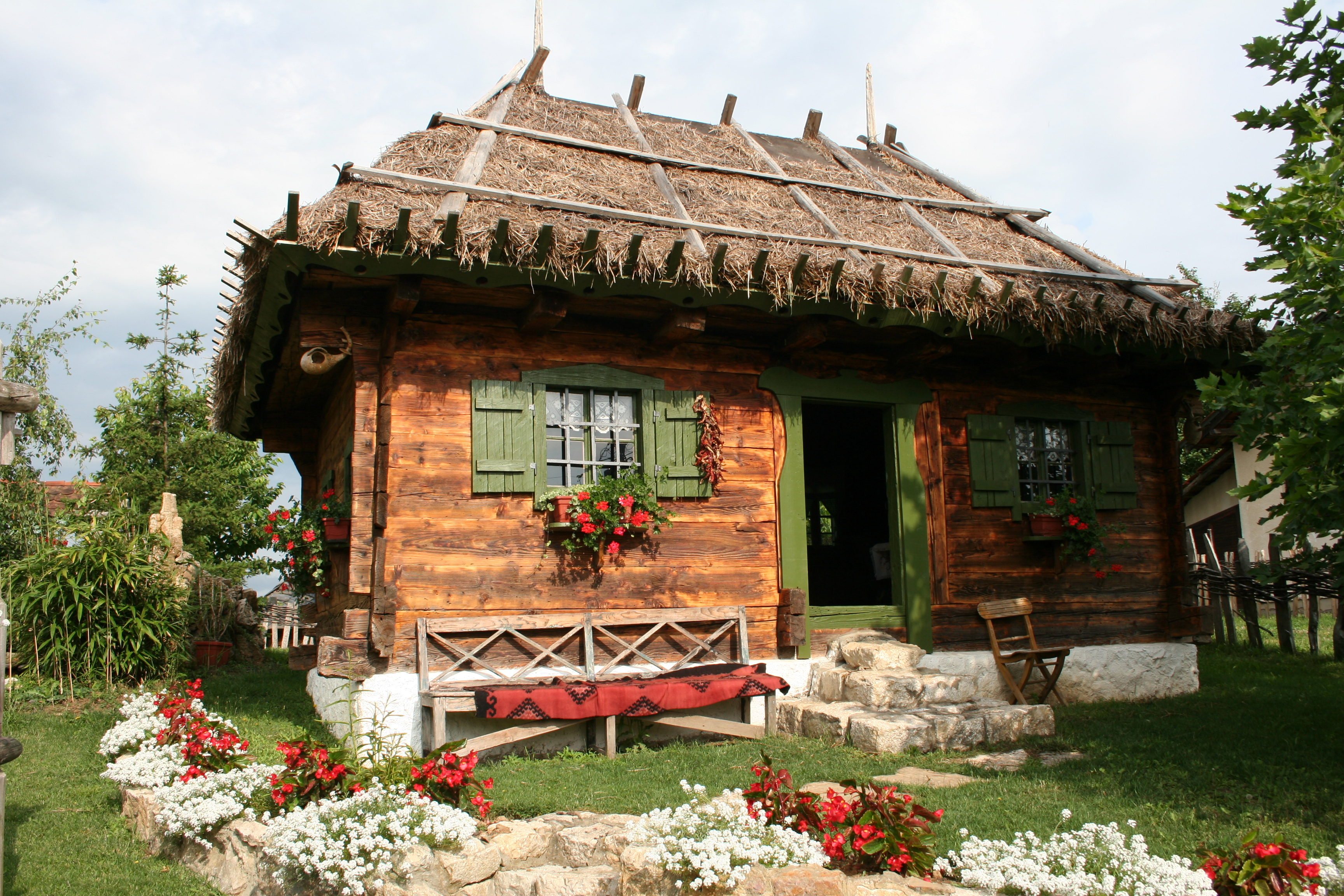 Etno selo "Kneževa večera" Belotić, opština Vladimirci